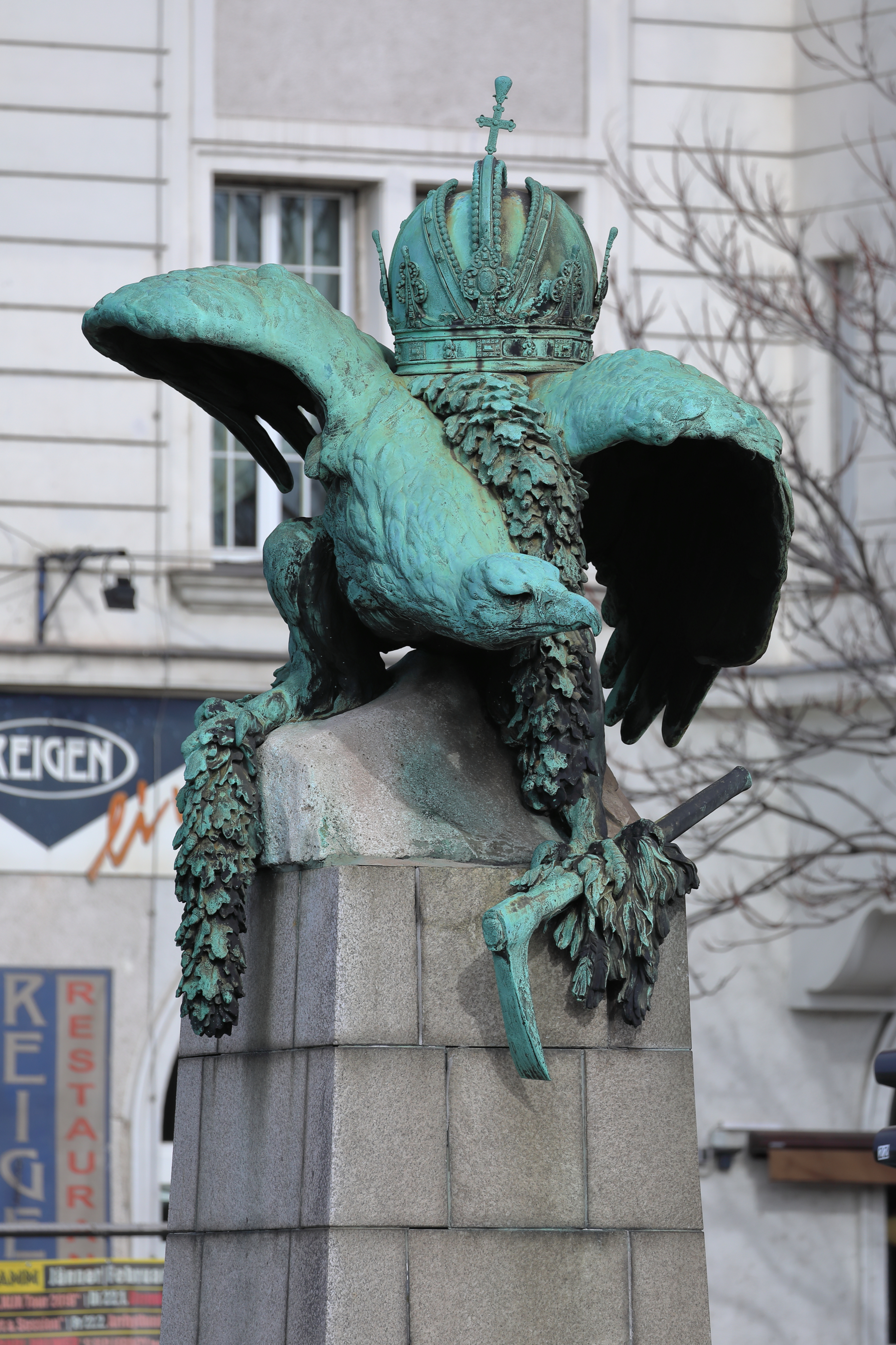 Der nördliche kronetragender Bronzeadler an der Kennedybrücke im 14. Wiener Bezirk Penzing.Im Zuge der Errichtung der "Kaiser-Franz-Joseph-Brücke" (1898-1900), später als Hietzinger Brücke bezeichnet, wurden von Arthur Strasser zwei Bronzeadler geschaffen. Nachdem Anfang der 1960er Jahren die Hietzinger Brücke abgerissen wurde und man die Kennedybrücke errichtete, wurden die Bronzeadler hierher übertragen.